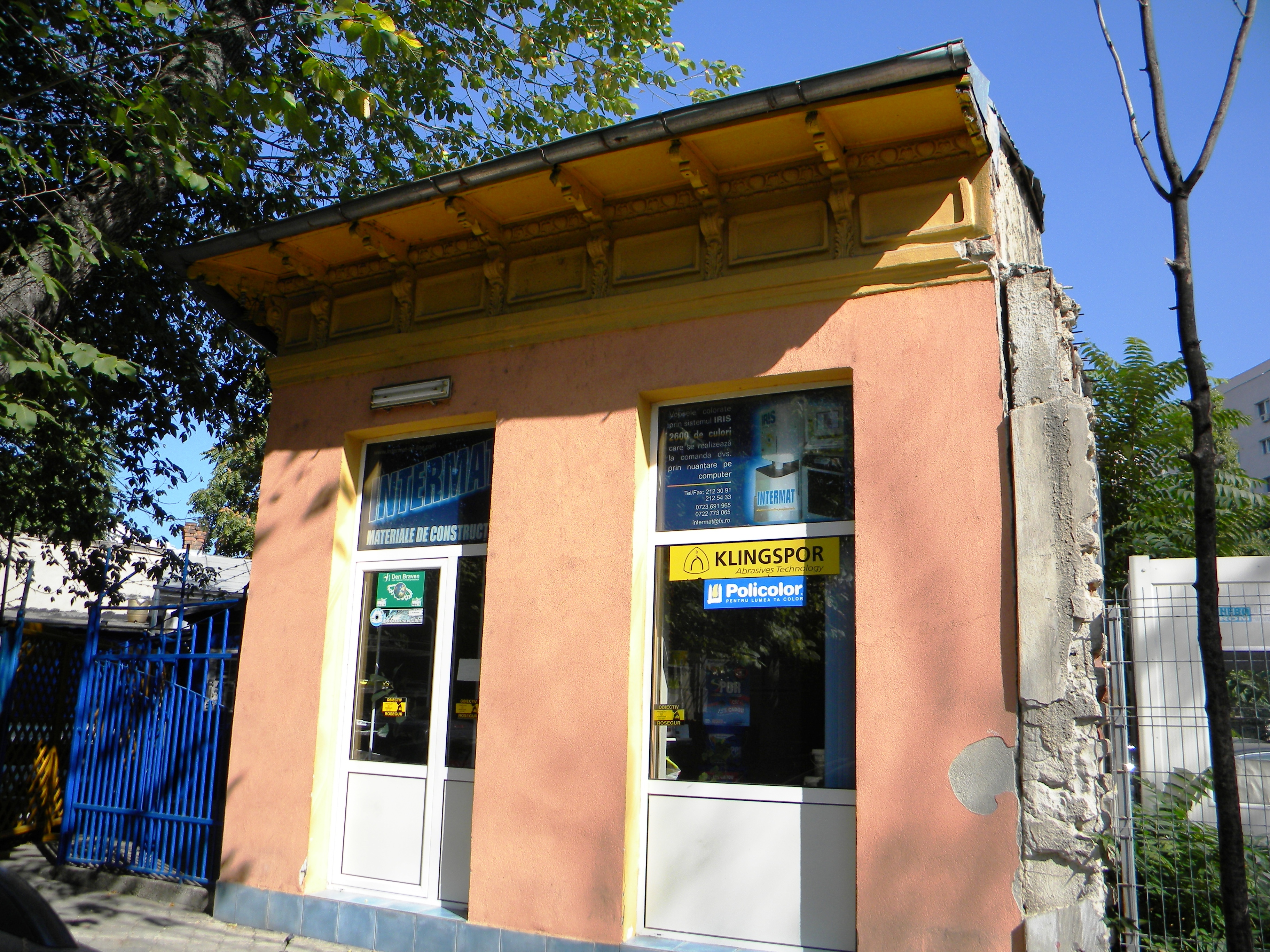 Bucuresti, Romania, Str. Alexandru Ioan Cuza nr. 24; B-II-m-B-18522 (2)